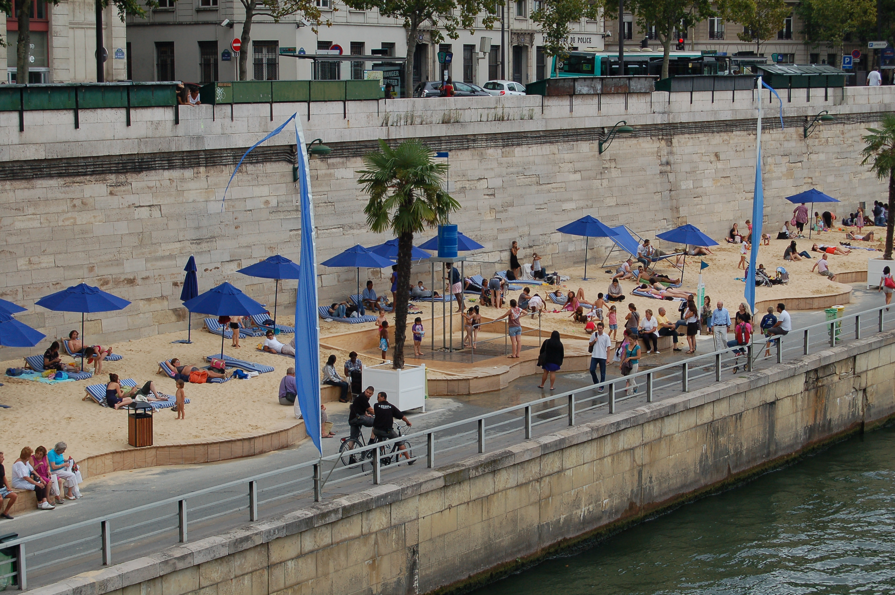 Paris plages édition 2011